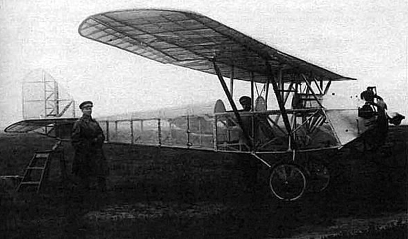 Советский Прозрачный Самолёт Козлова. Построен в 1930-ых годах.